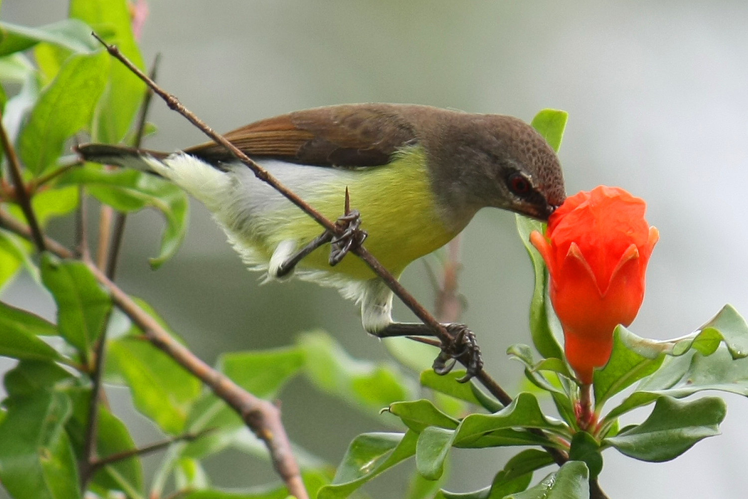 ஊதாப்பிட்டு தேன்சிட்டு